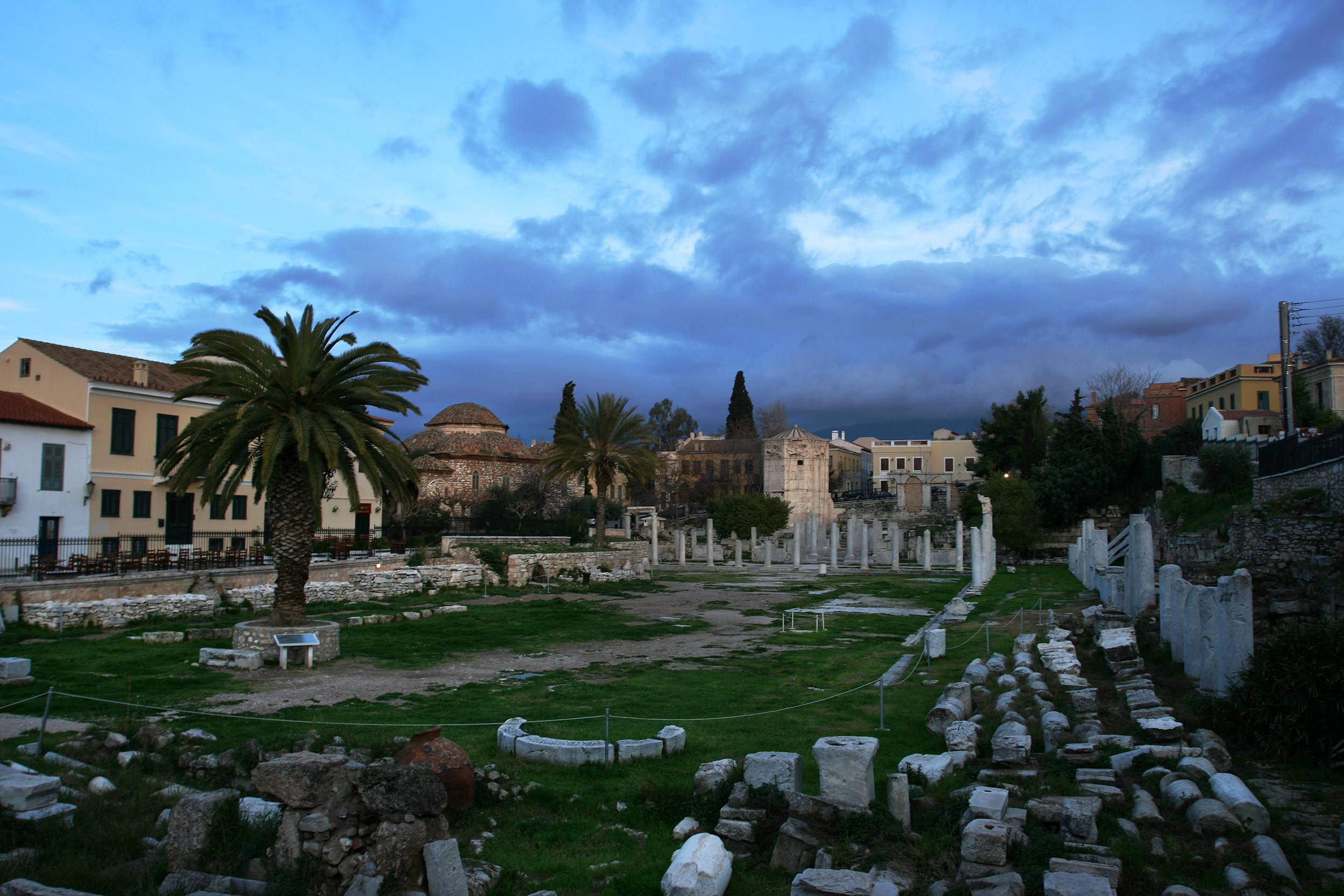 Ρωμαϊκή Αγορά Αθηνών«Ρωμαϊκή Αγορά της Αθήνας»